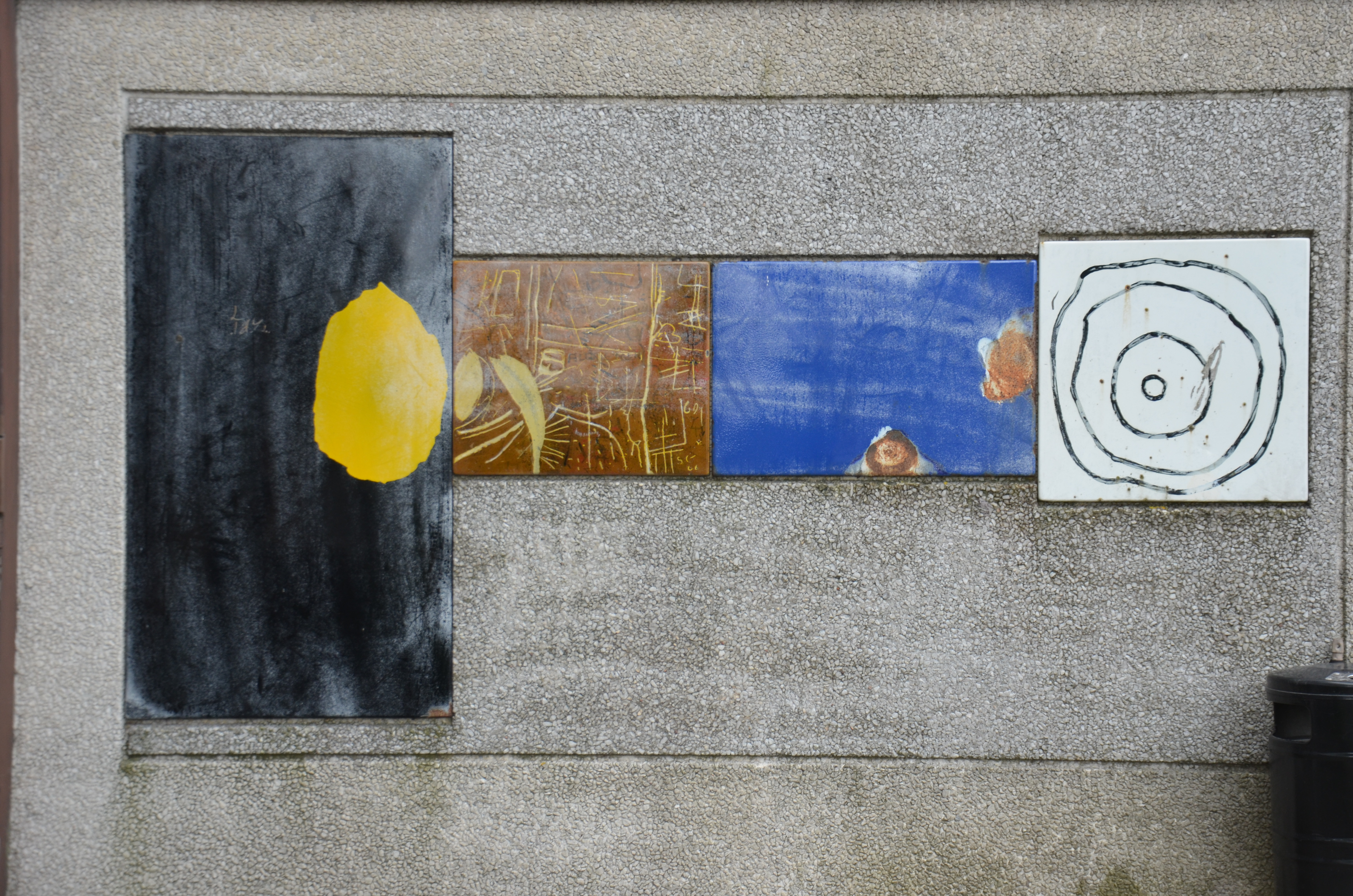 Klotter' på Förlandagränd 44 i Östberga i Stockholm av Stig Ghylfe